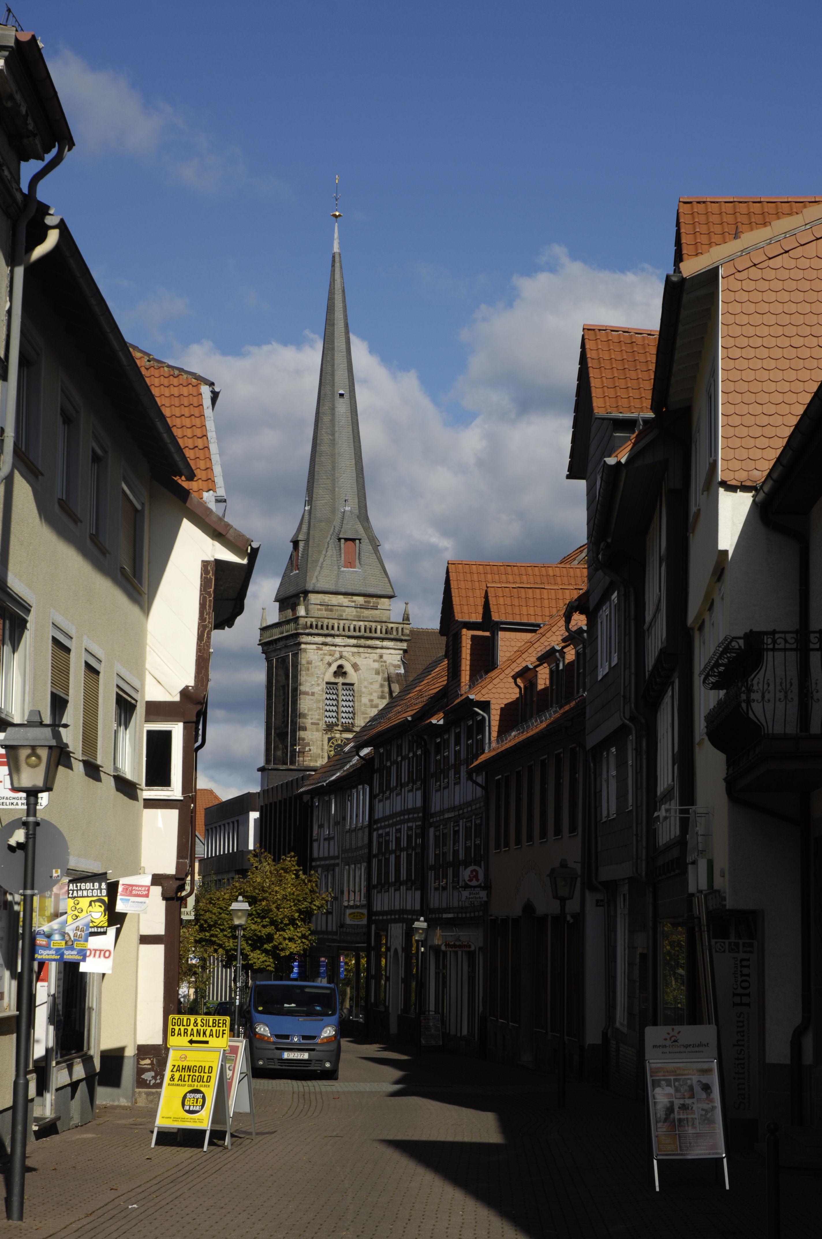 Hessisch Lichtenau, Blick in die Innenstadt